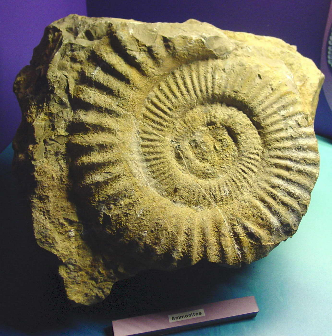 self made. Domus da Coruña, Galicia, Spain